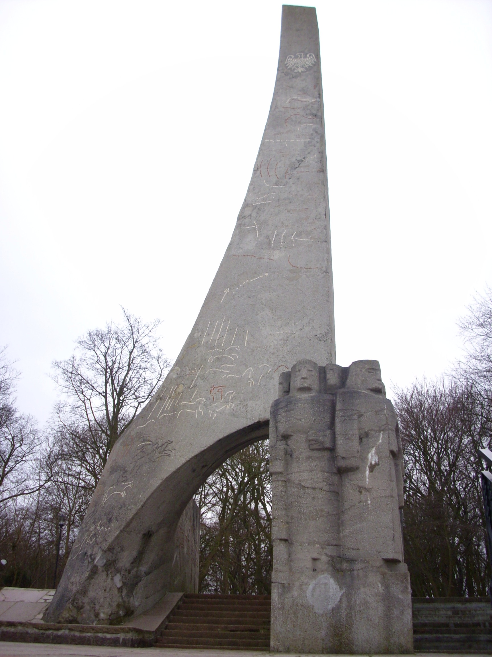 Kołobrzeg. Pomnik Zaślubin z morzem.